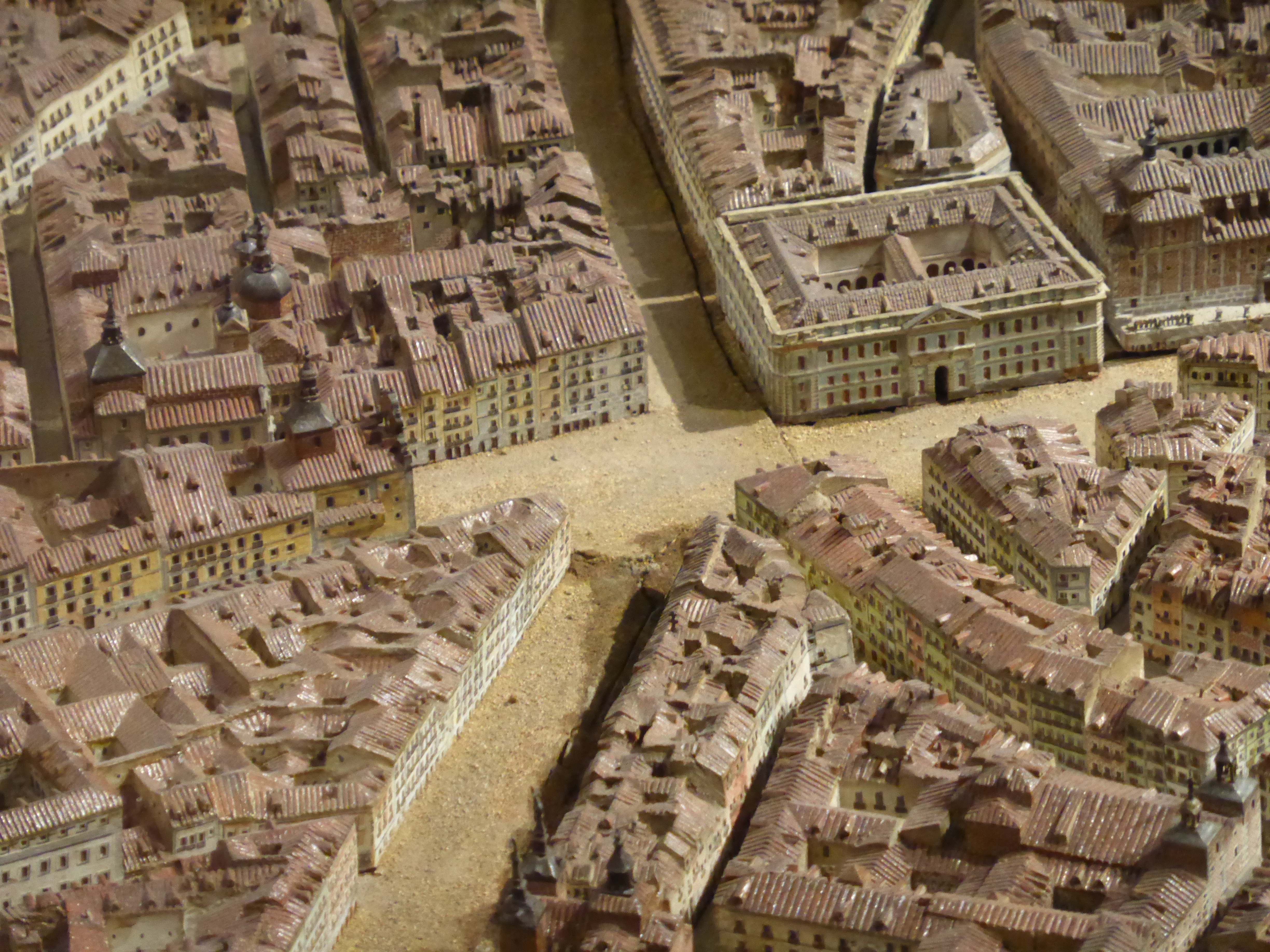 La céntrica plaza madrileña conocida como Puerta del Sol, por los años 1828-1830, antes de su reforma. Maqueta del ingeniero y cartógrafo militar León Gil de Palacio. Museo Municipal, hoy llamado "Museo de Historia" de Madrid.